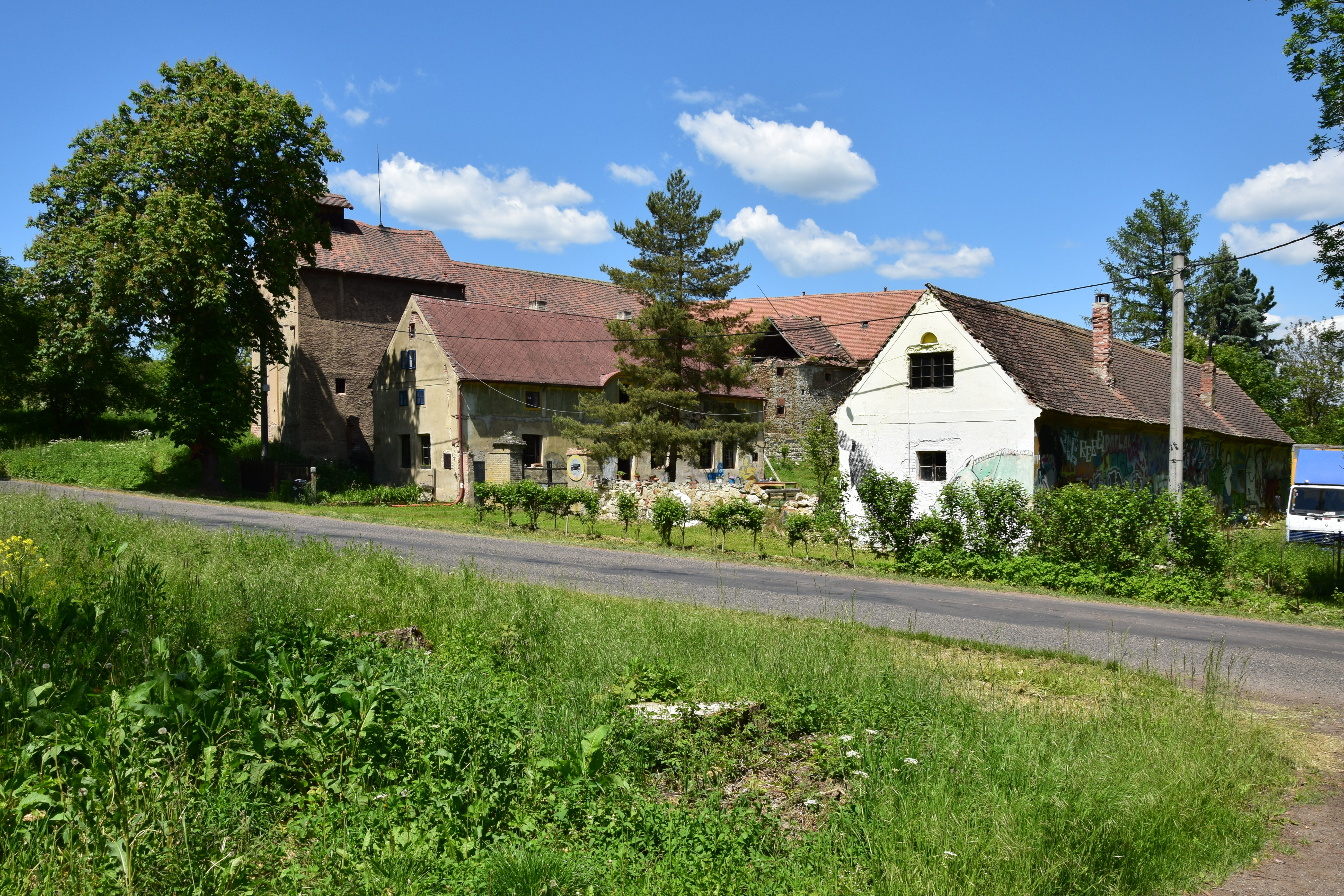 Zaniklá osada Čárka (Carka) u Liběšovic